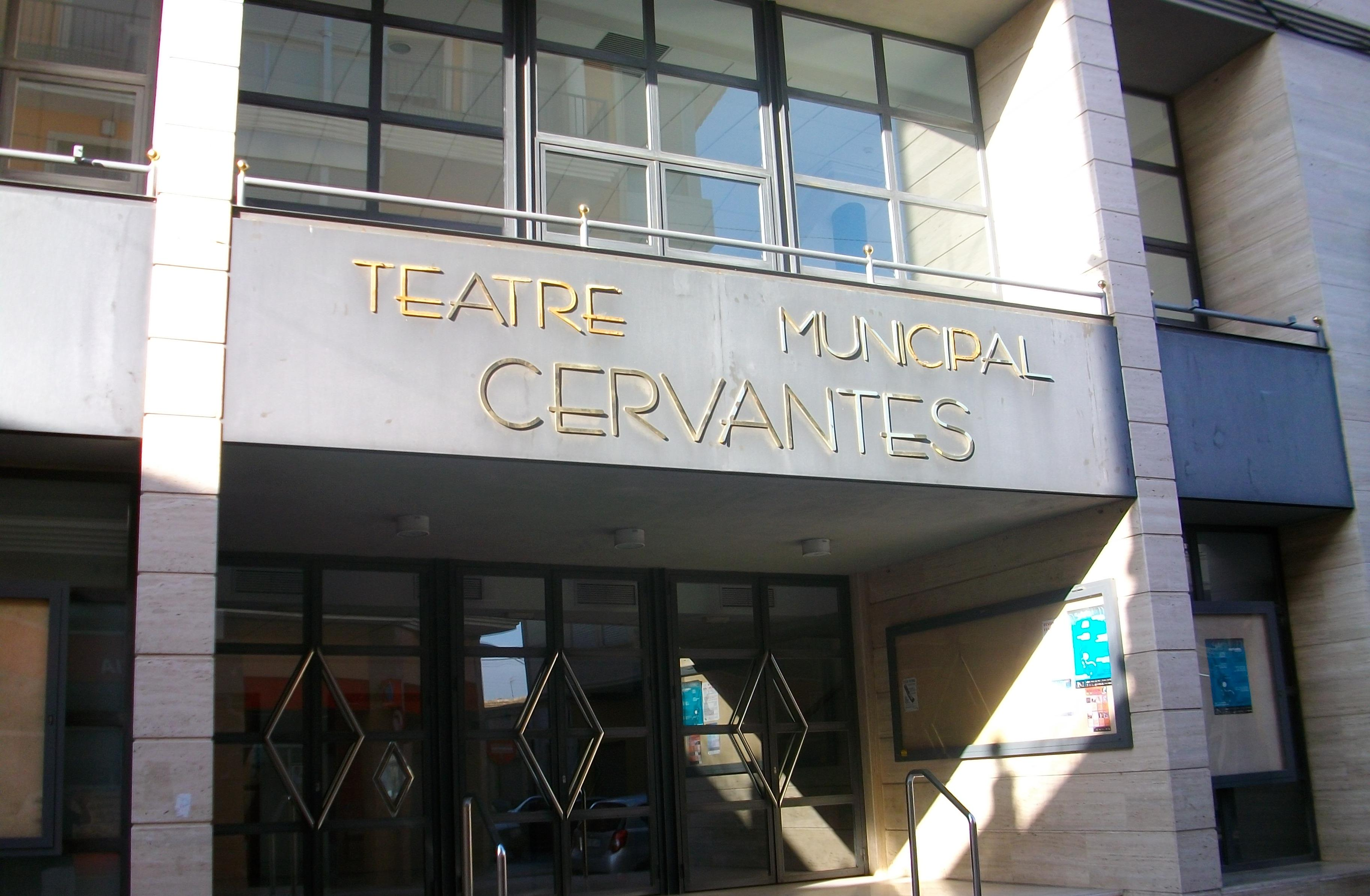 Teatre Municipal Cervantes. Teatro Municipal Cervantes